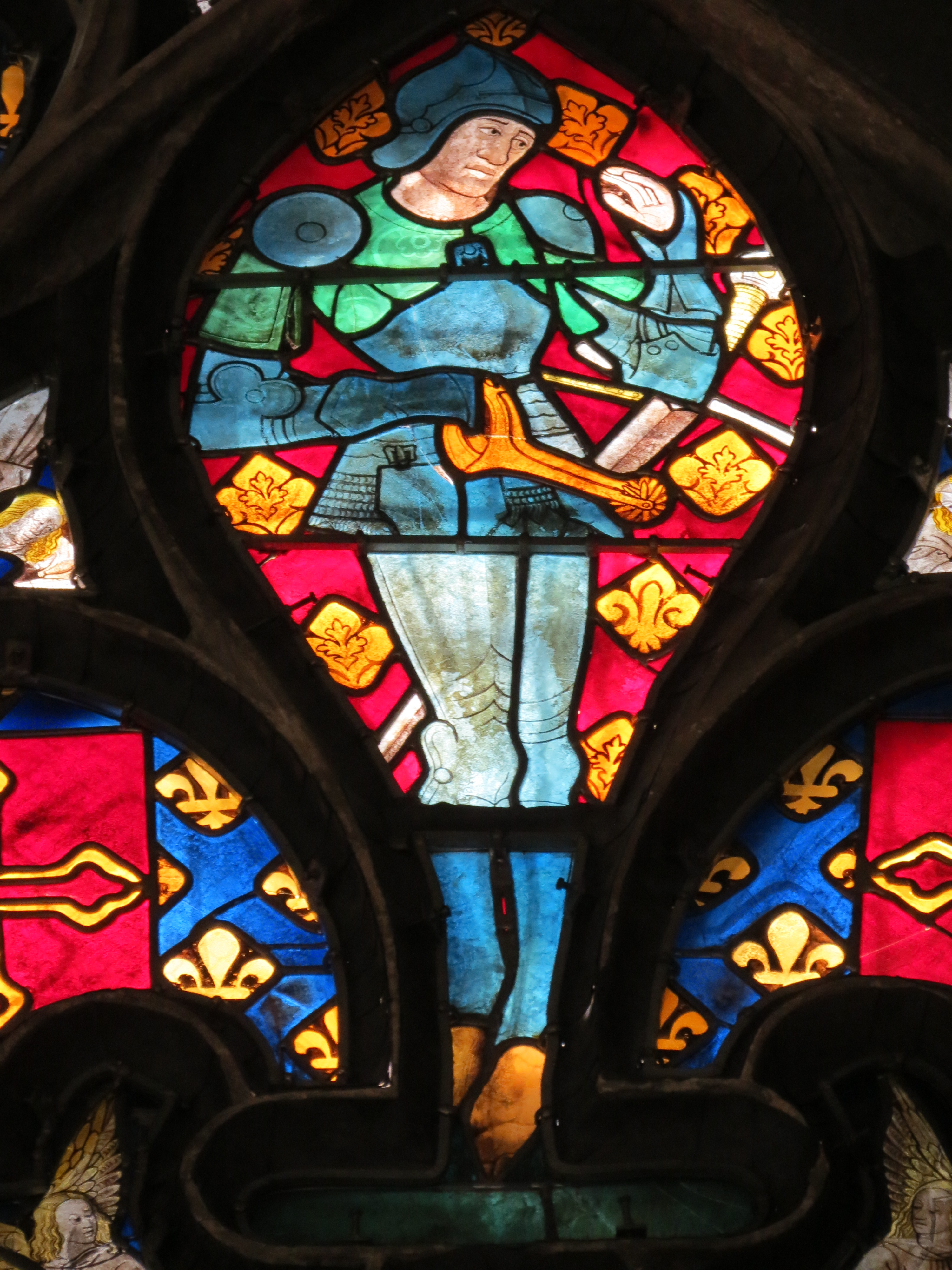 Le comte de Vendôme Jean VIII de Bourbon remplace le comte de Toulouse et tient les éperons.